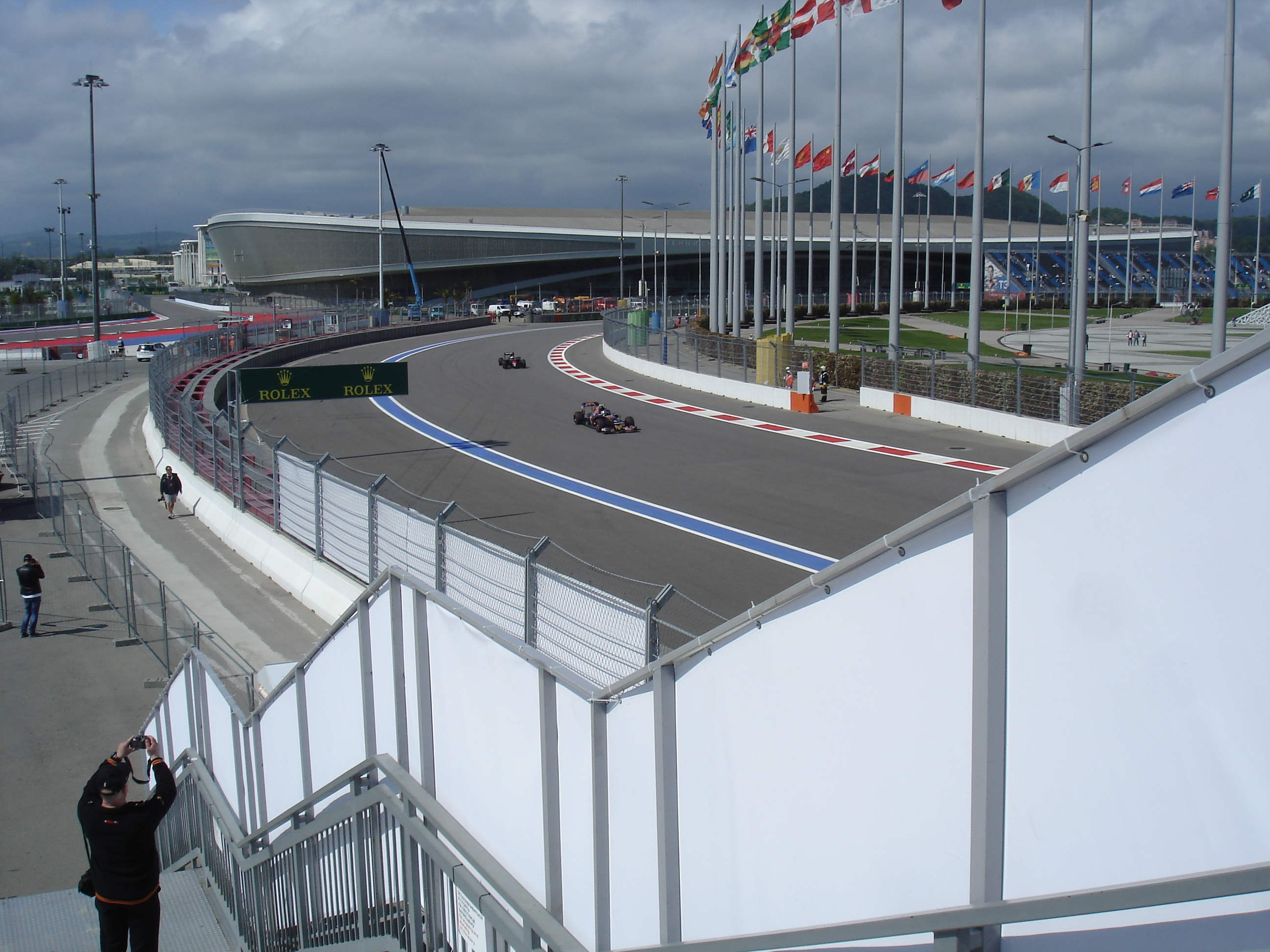 Формула-1 в Сочи, 2016 год - один из болидов Торо Россо на трассе